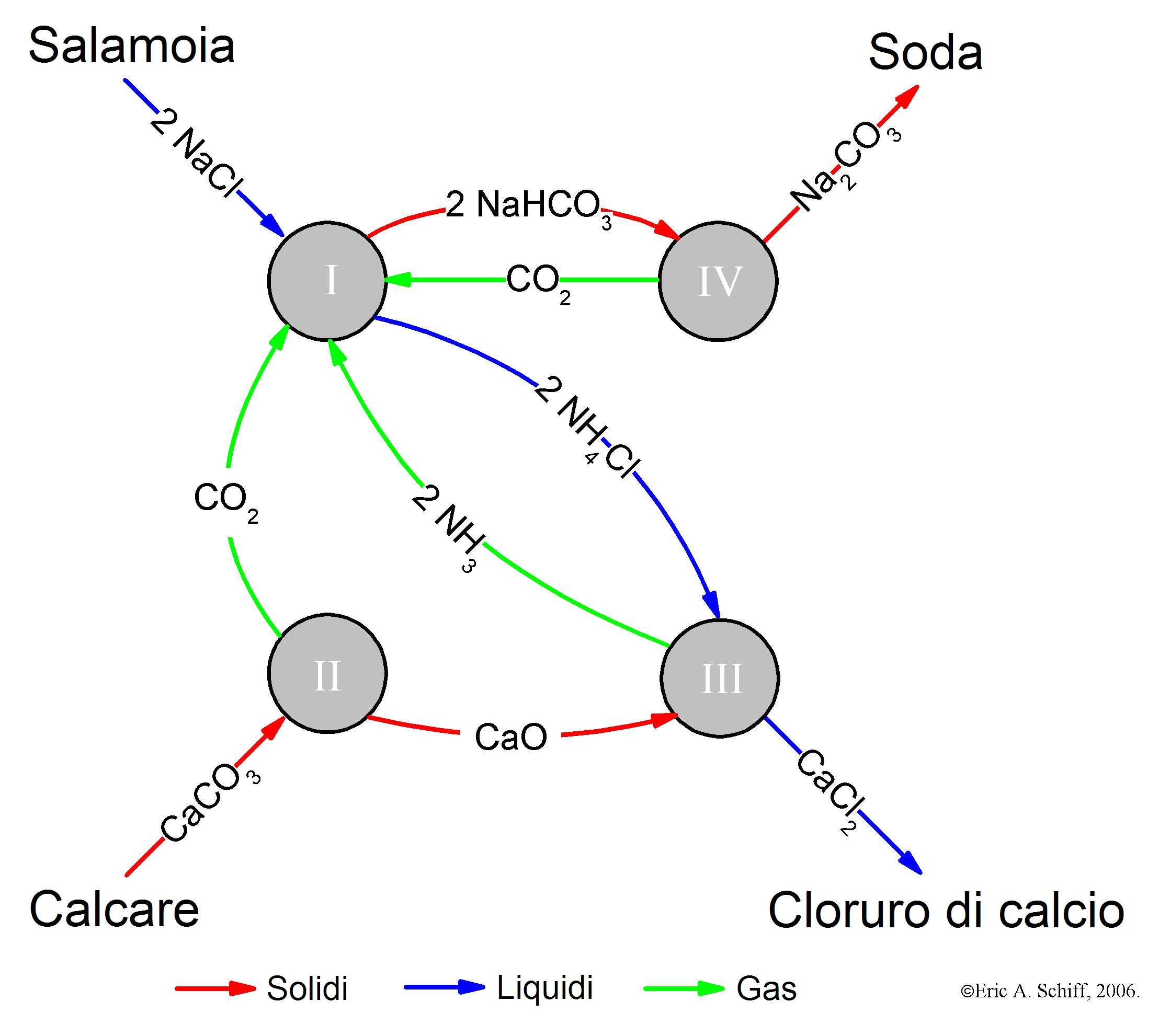 Processo Solvay per la produzione della soda (carbonato di sodio).